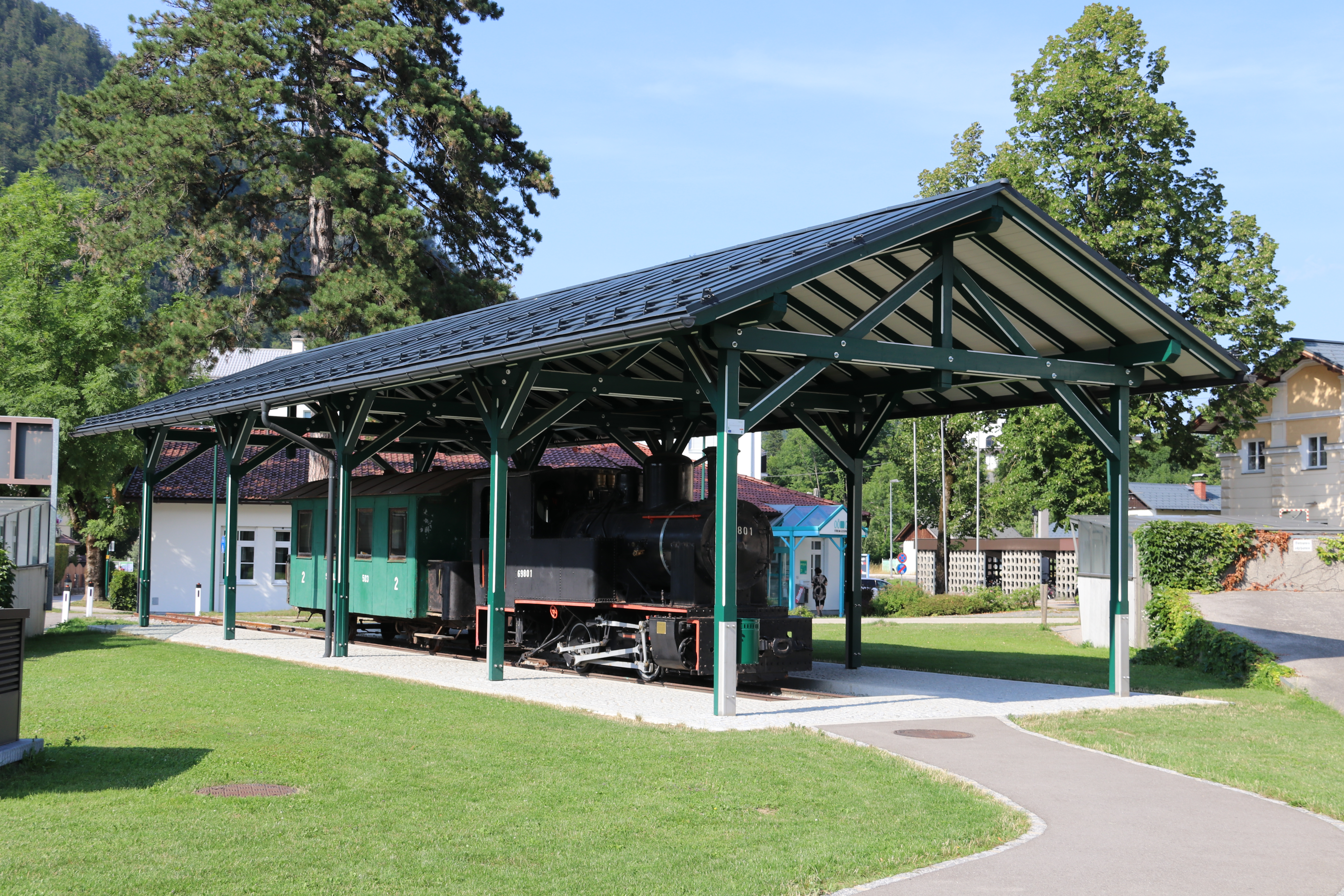 Denkmal für die Salzkammergutlokalbahn am Bahnhof Bad Ischl, 698.01 ex ÖBB und SKGLB C 503